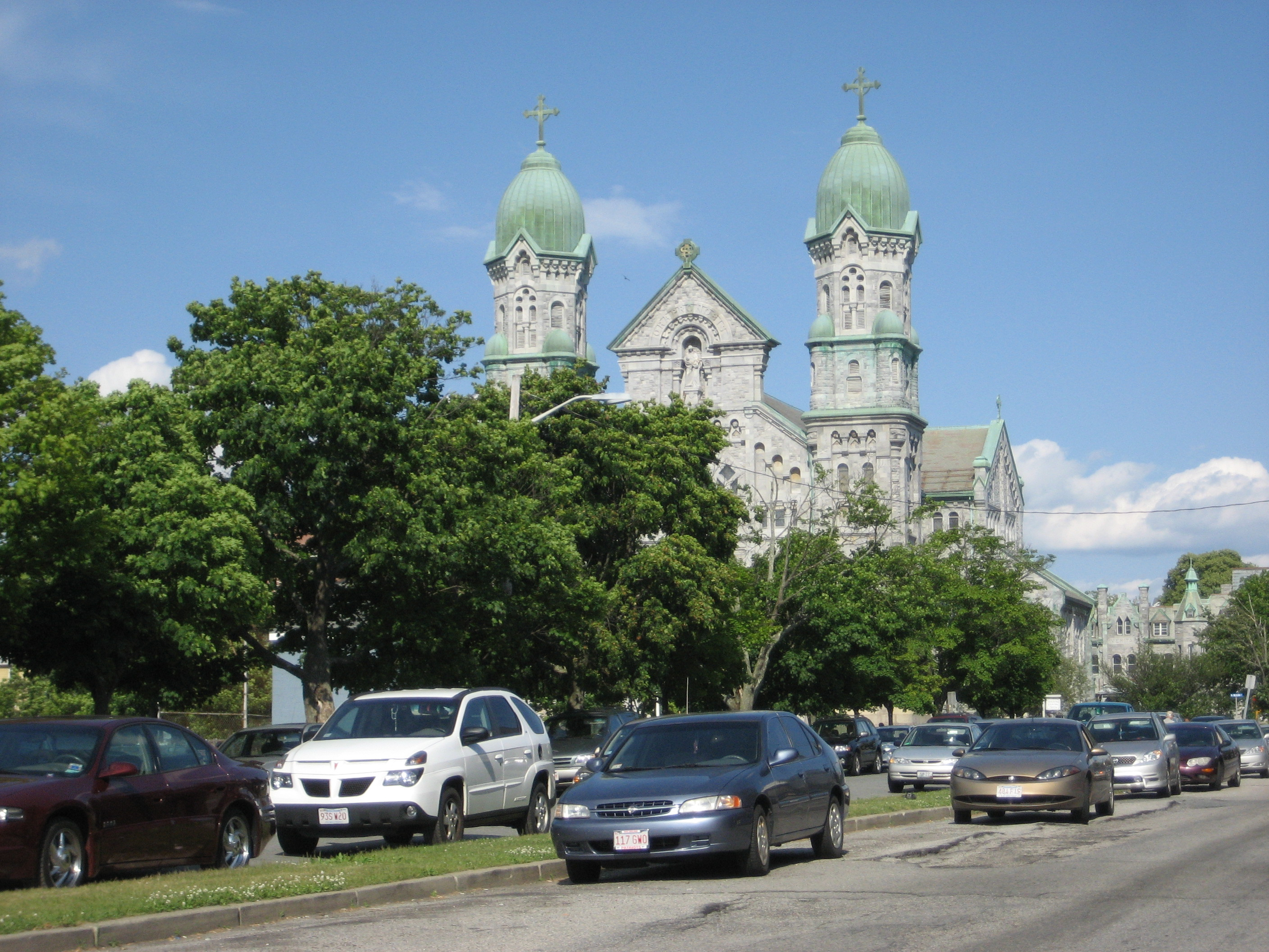 Fall River, Massachusetts: St. Anne's Church